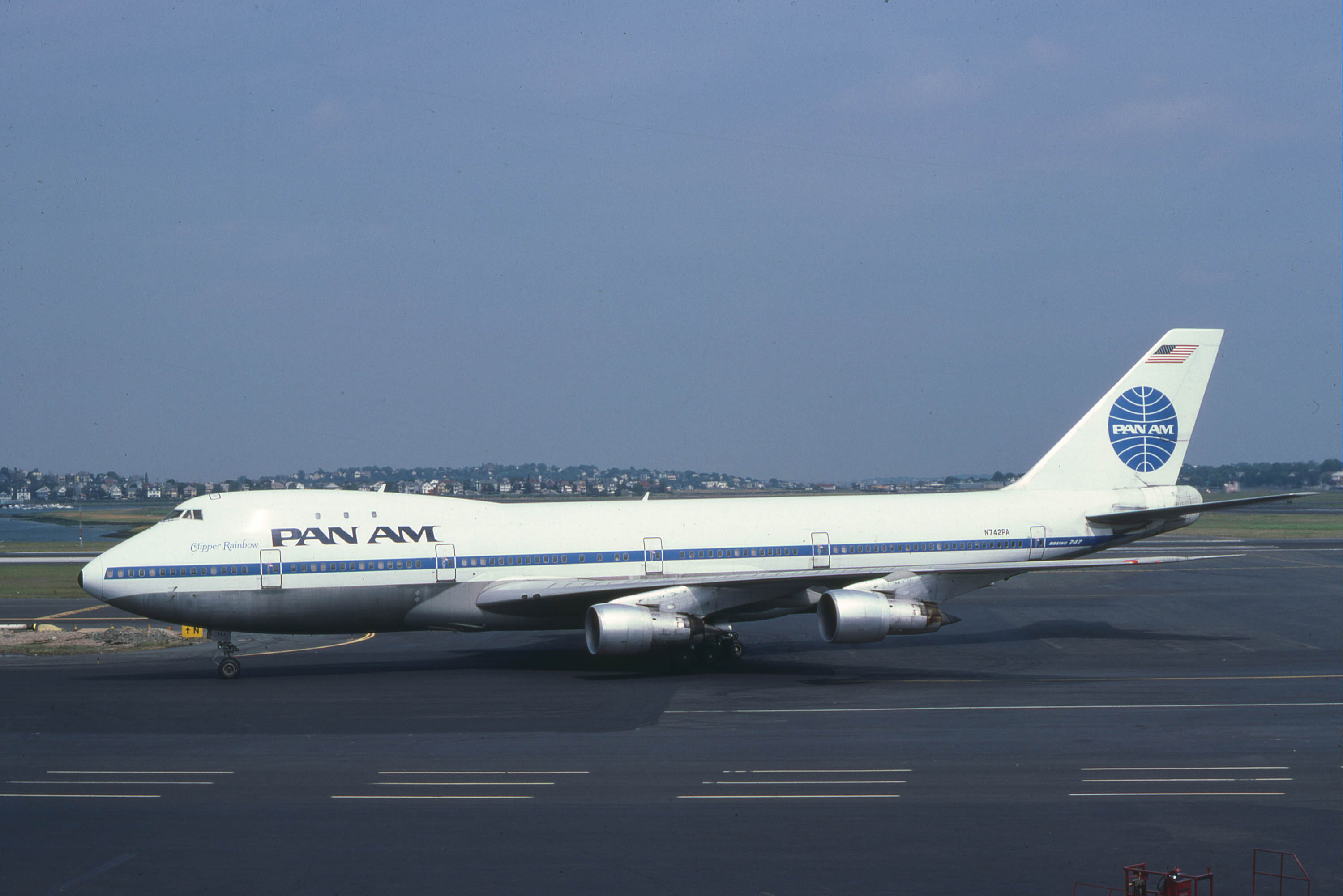 Boston 1979